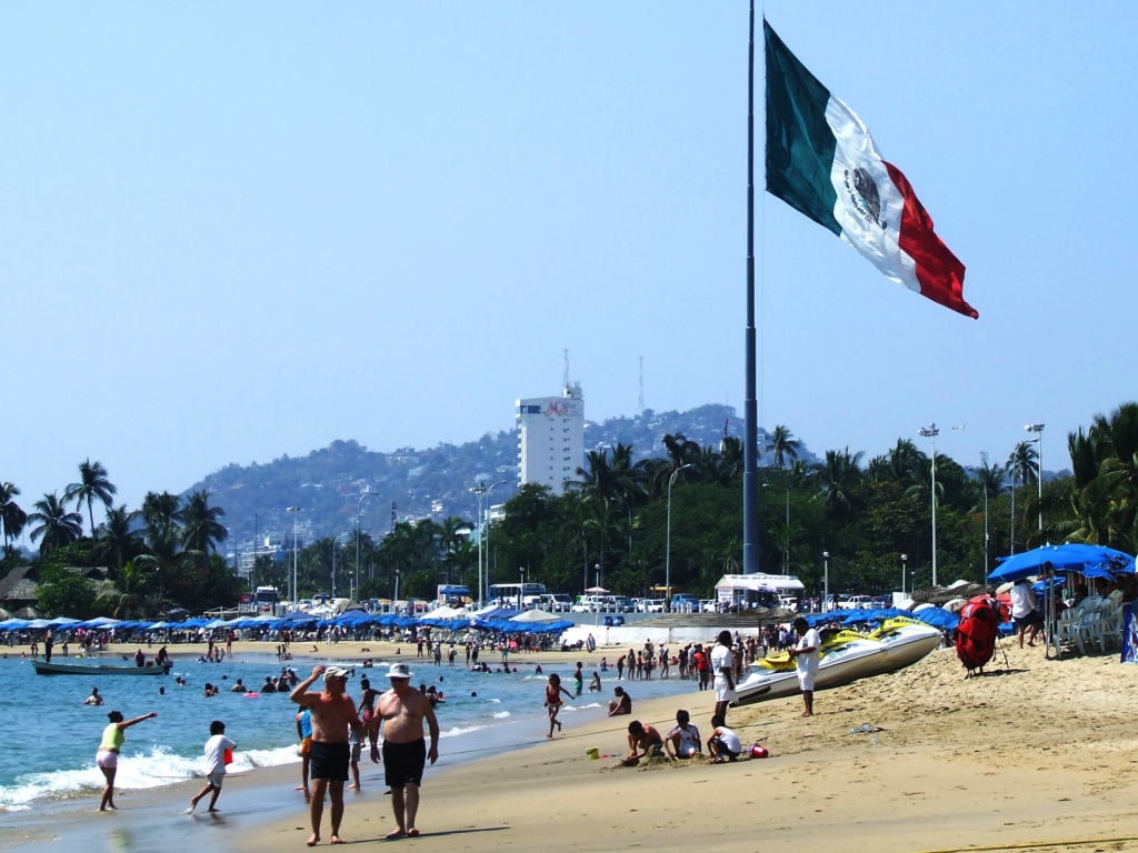 Bandera de México en Acapulco, Guerrero, México.